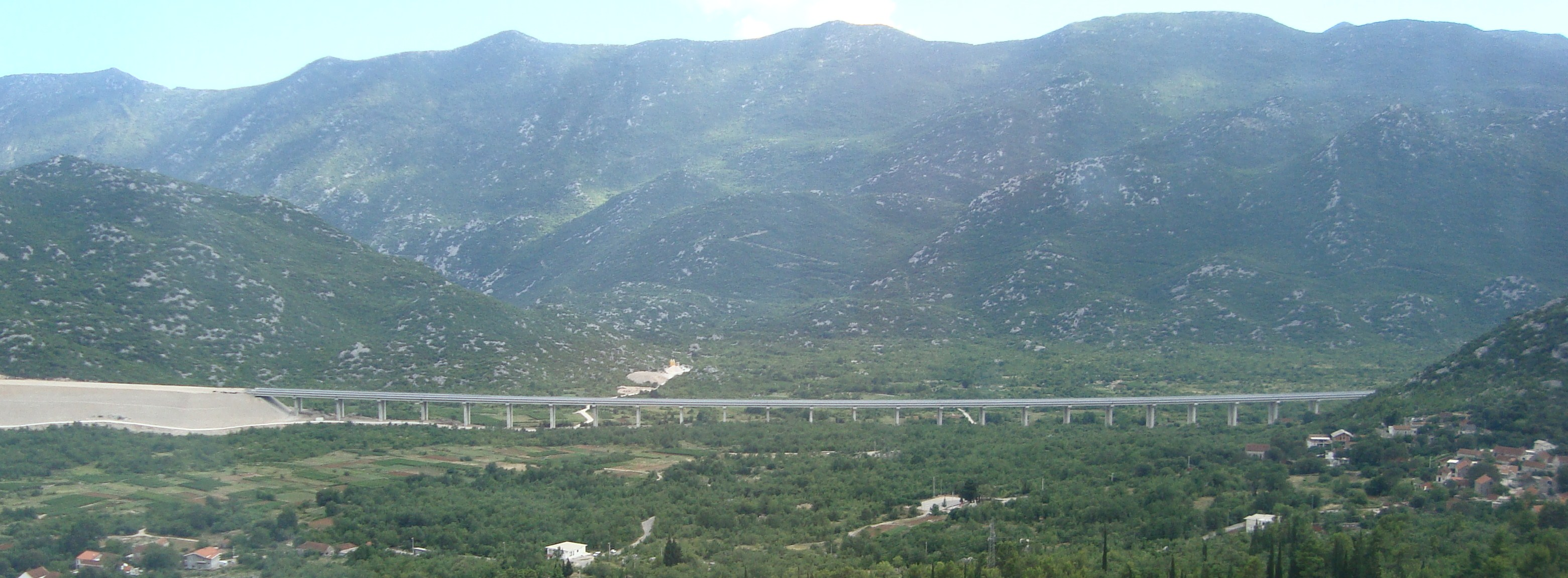 Travaux de prolongement de l'autoroute A1 en Croatie près de Vrgorak.